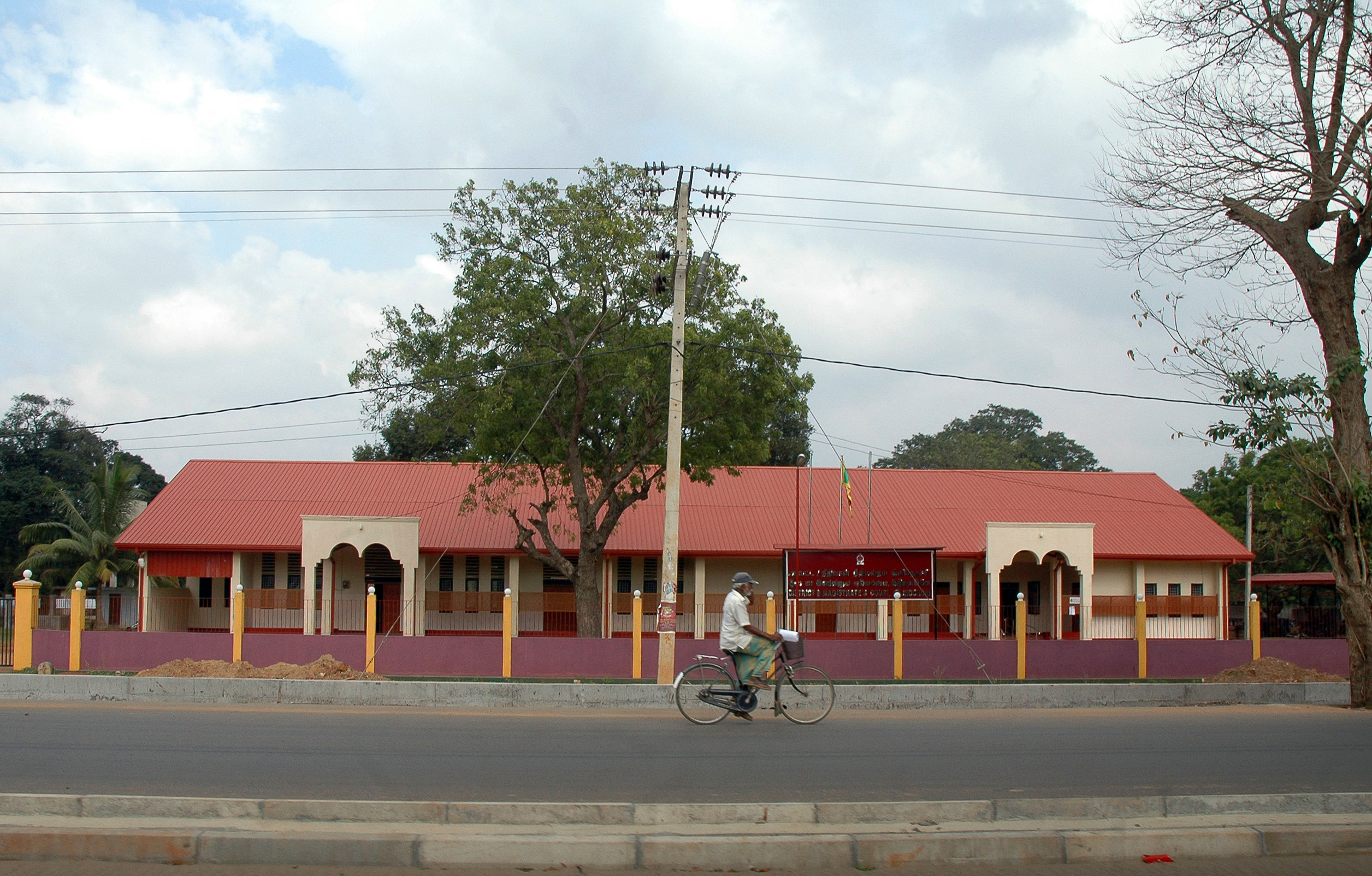 கிளிநொச்சி மாவட்ட நீதிமன்றம்